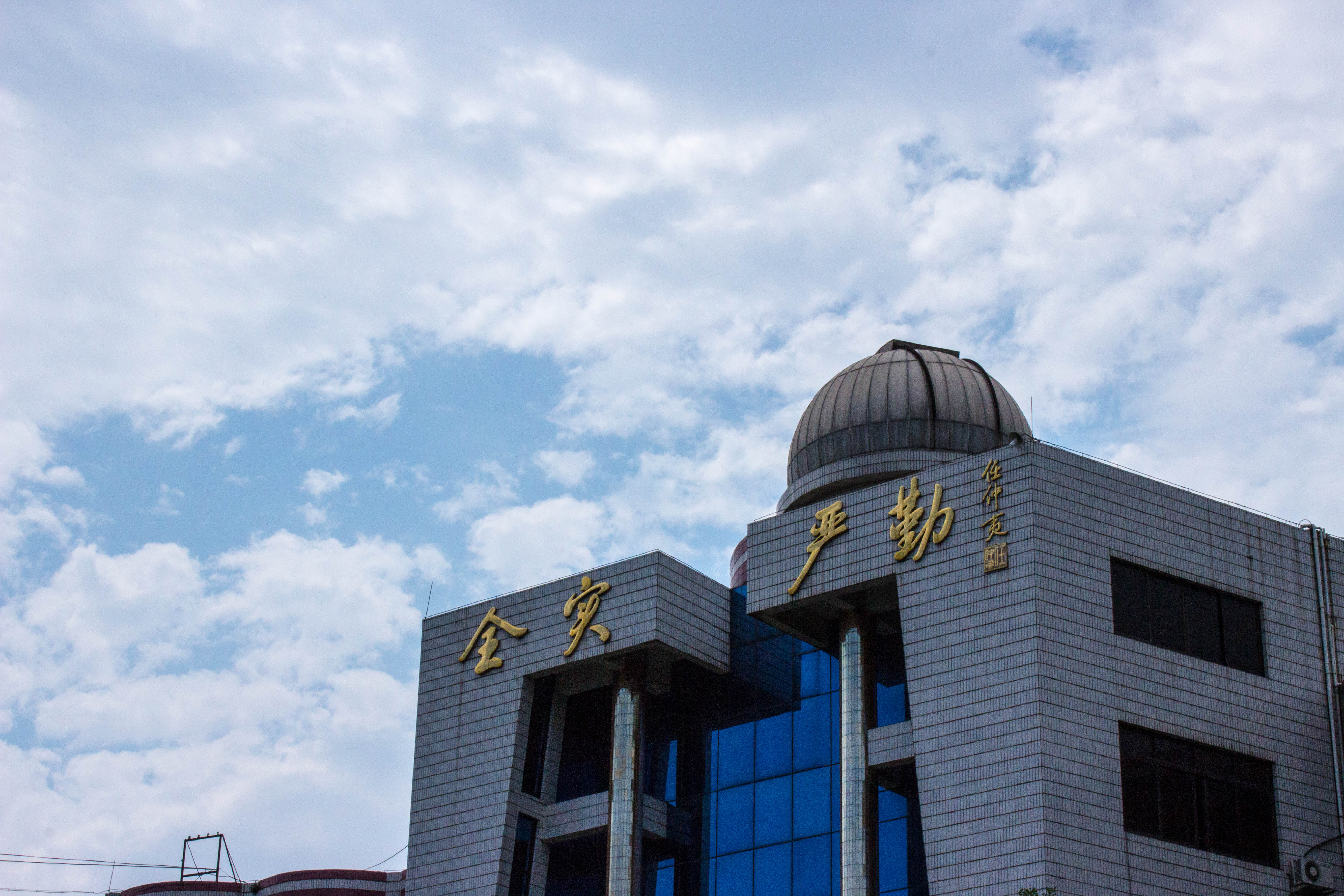 广东北江中学电教楼的照片